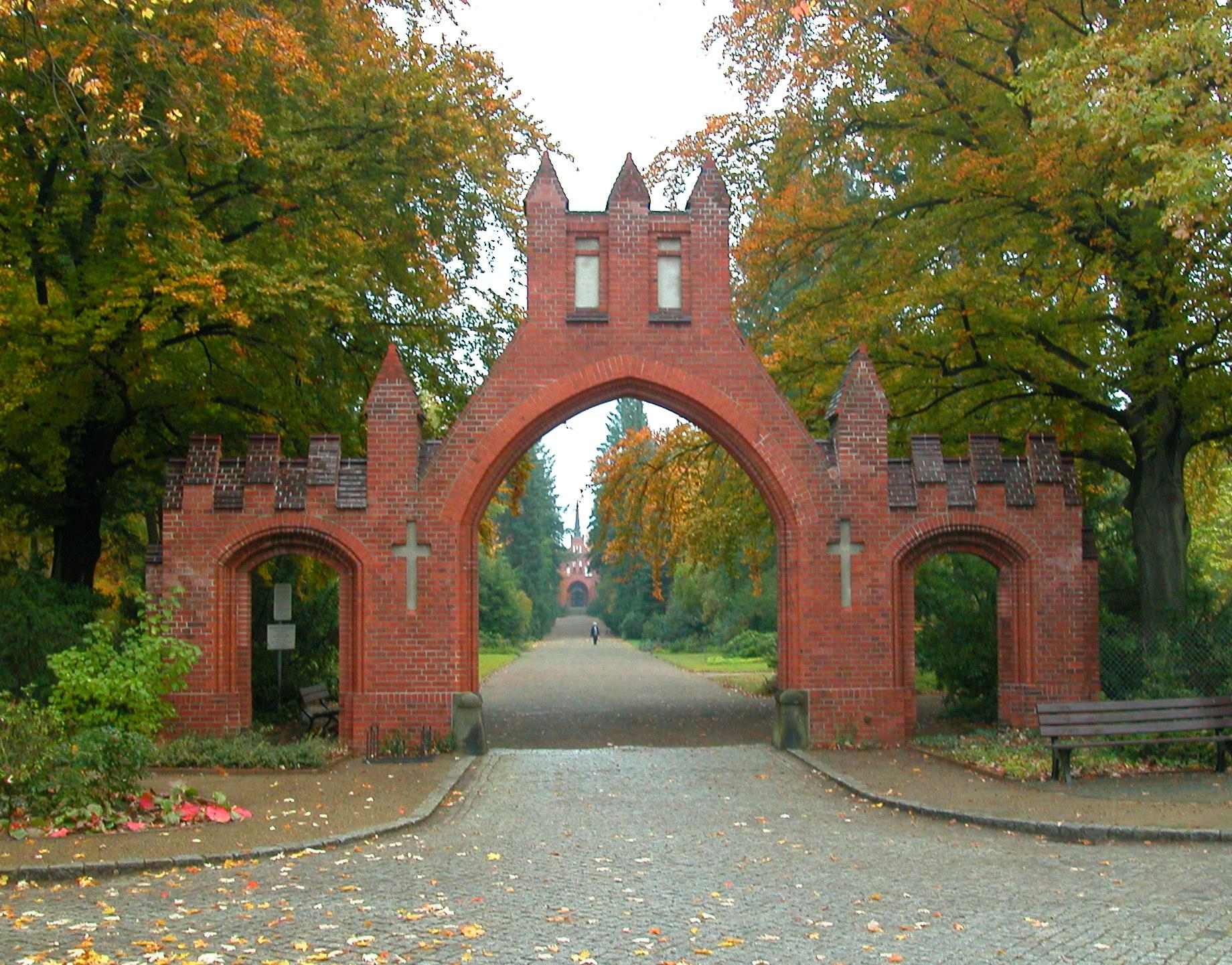 92 Südfriedhof1